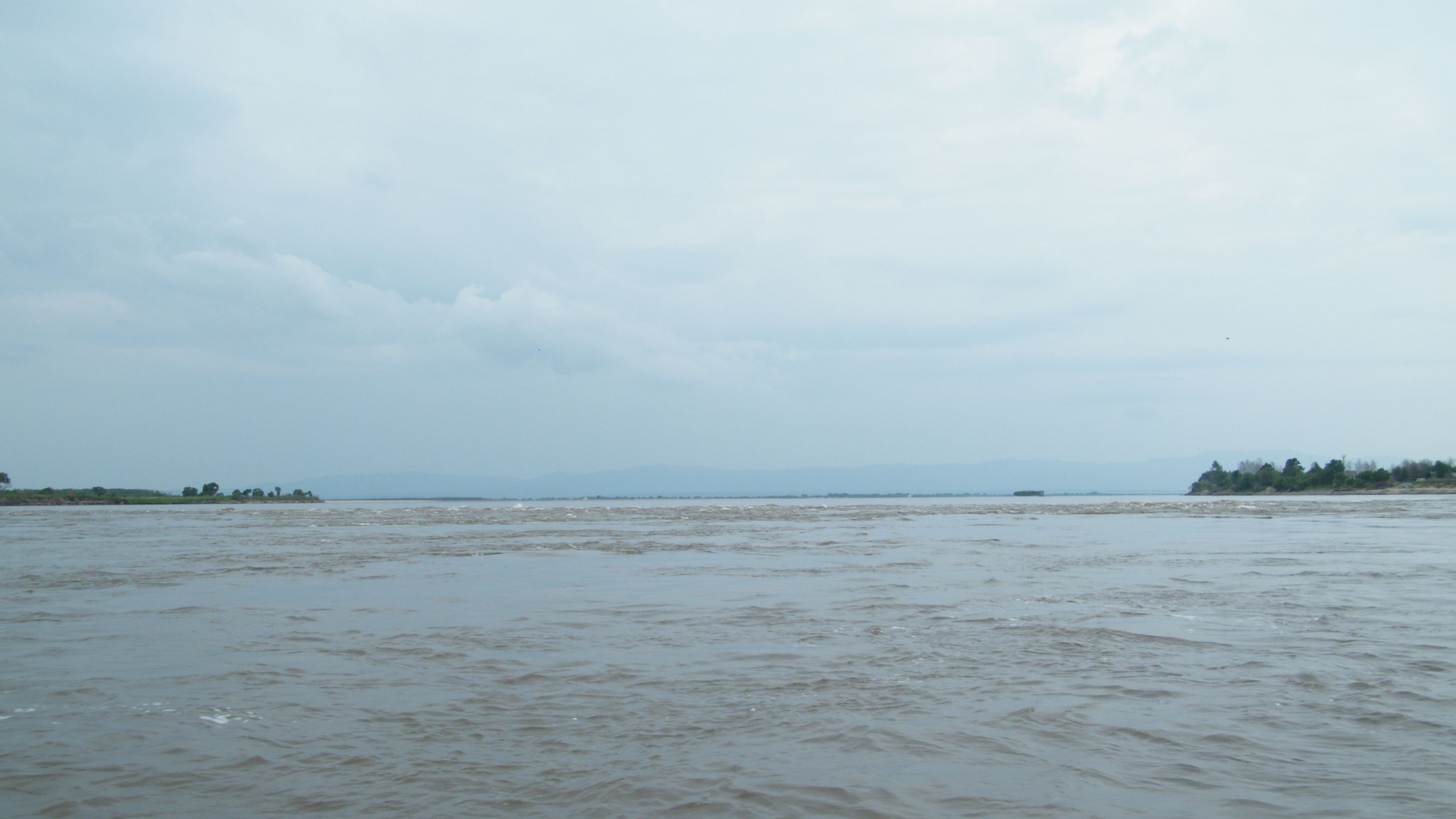 Переливная запруда на протоке Пемзенская село Владимировка ЕАО июнь 2014